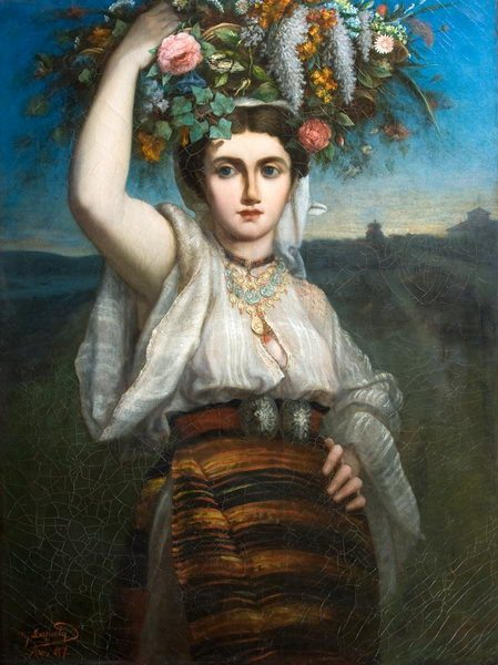 Mihail Lapaty - Buchetiera, ulei pe pânză, Pinacoteca Statului.